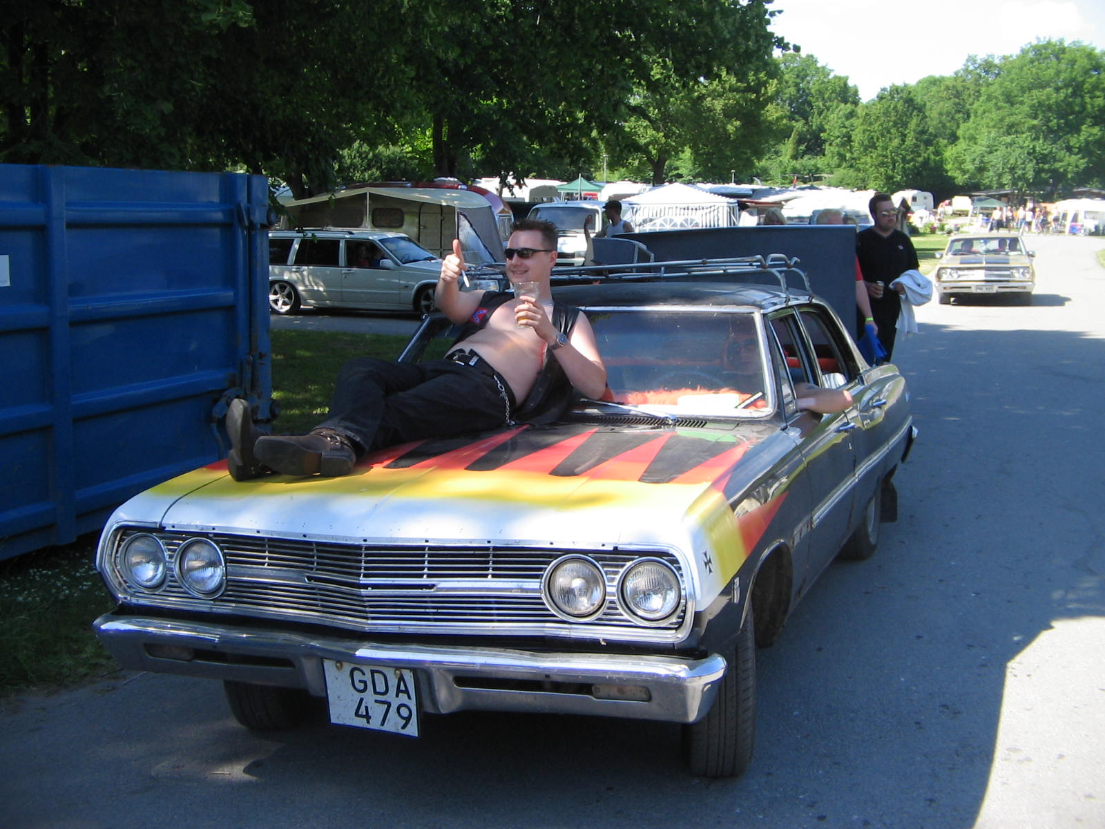 A 1965 Chevrolet Chevelle 13569.